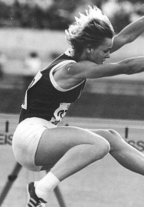 Factual corrections and alternative descriptions are encouraged separately from the original description. Additionally errors can be reported at this page to inform the Bundesarchiv. Original historic description: Angela Voigt ADN-ZB Demme 2.5.76 SFRJ: Leichtathletik-Dreiländerkampf in Split. Am ersten Tag des Leichtathletik-Dreiländerkampfes zwischen Großbritannien, Jugoslawien und der DDR (1.5.) zeigte Angela Voigt aus der DDR mit 6,61 m im Weitsprung eine gute Leistung (Foto von einem früheren Wettbewerb)